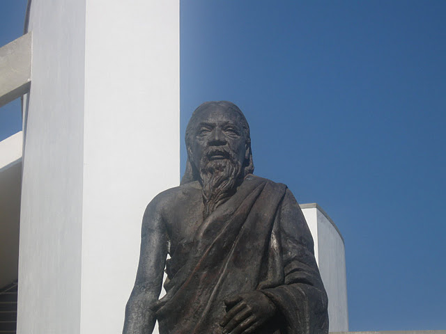 ஆரோவில் சாவித்திரி பவனில் இருக்கும் மகான் ஸ்ரீஅரவிந்தரின் சிலைவடிவம்